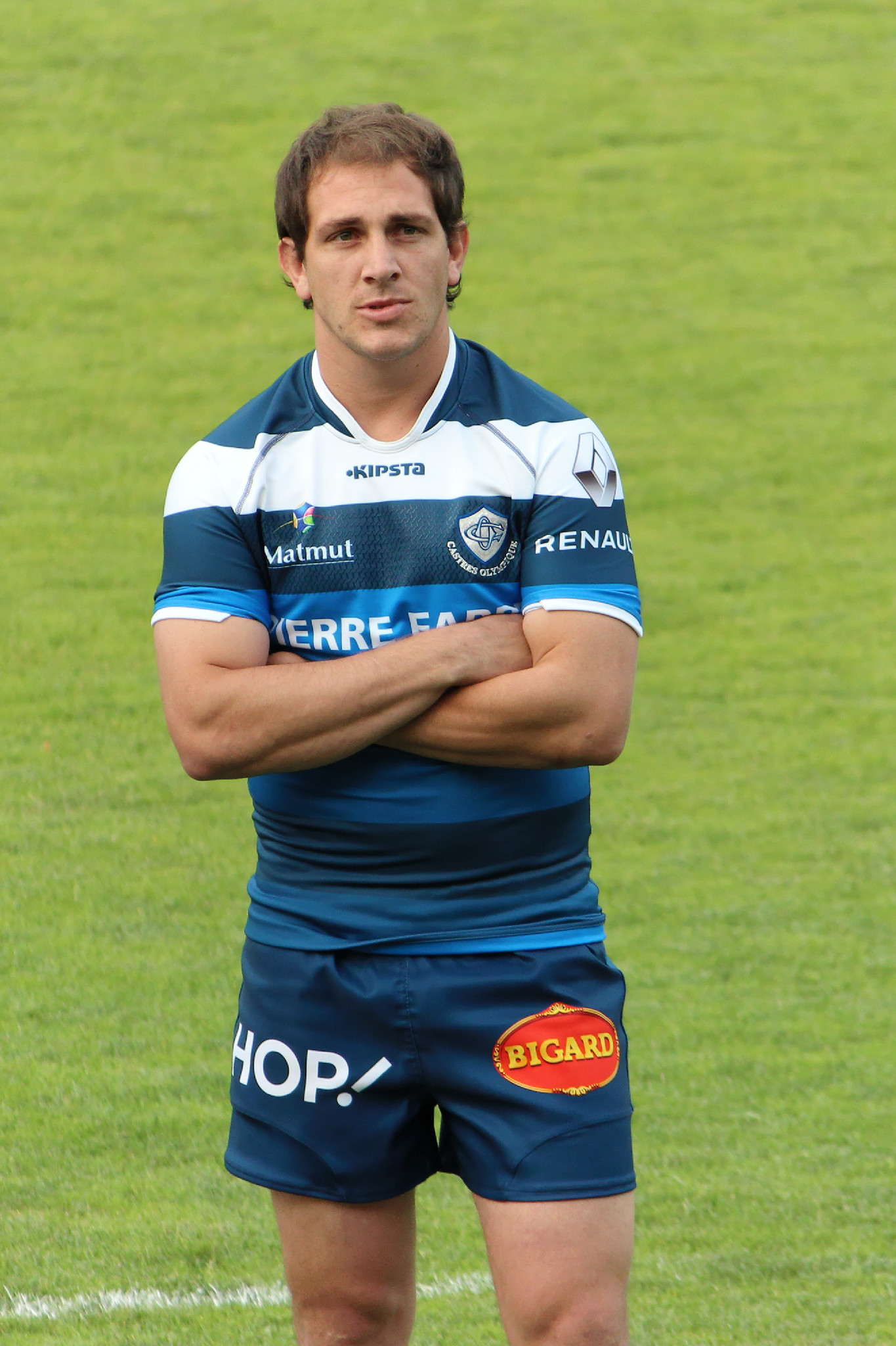 Joueurs du Castres Olympique lors de la présentation de l'équipe pour la saison 2015-2016